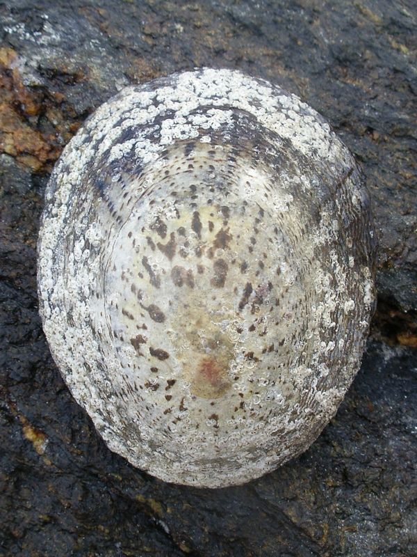 マツバガイ死殻（表）, 殻長8cm, 長崎市柿泊 (Cellana nigrolineata, Kakidomari, Nagasaki)